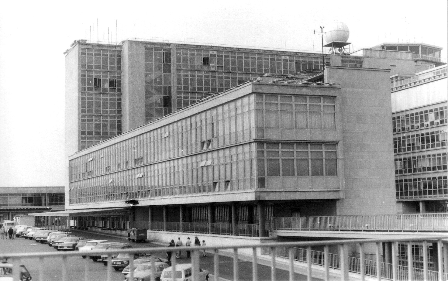 eigen foto Ben Pirard